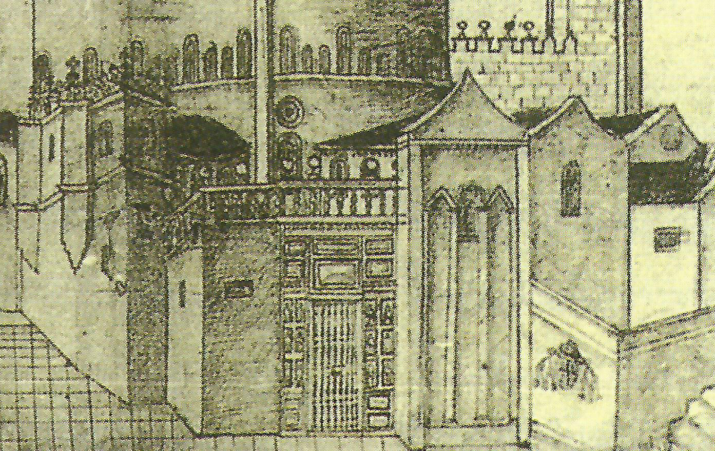 Detalle da Porta Santa na fachada leste da Catedral de Santiago, antes da reforma realizada en 1658.